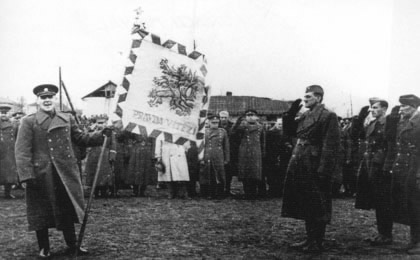 SSSR, Jefremovo, 22. dubna 1944 po závěrečném vojenském cvičení 2. čs. paradesantní brigády. Bojovou zástavu – brigádní prapor předává generál Heliodor Píka; veliteli brigády pplk. Vladimíru Přikrylovi , náčelníkovi štábu brigády škpt.gšt. Vilému Sacherovi a náčelníkovi operačního oddělení brigády kpt. Karlu Hlásnému (1911-1982)